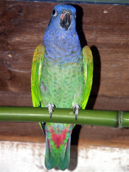 Essa é a Pionus menstruus.